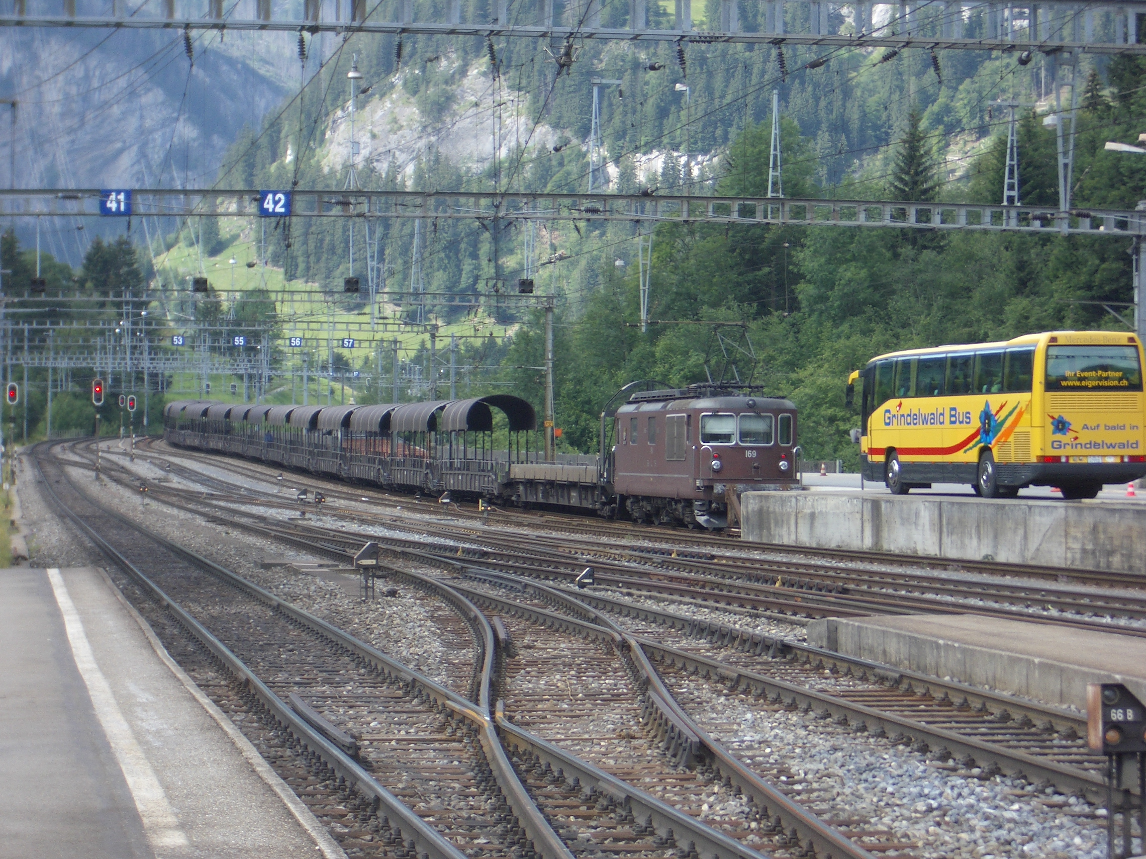 Autozug am Lötschberg mit BLS Re 4/4